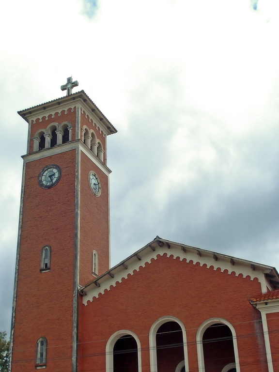 Templo católico de la ciudad de Malabrigo.